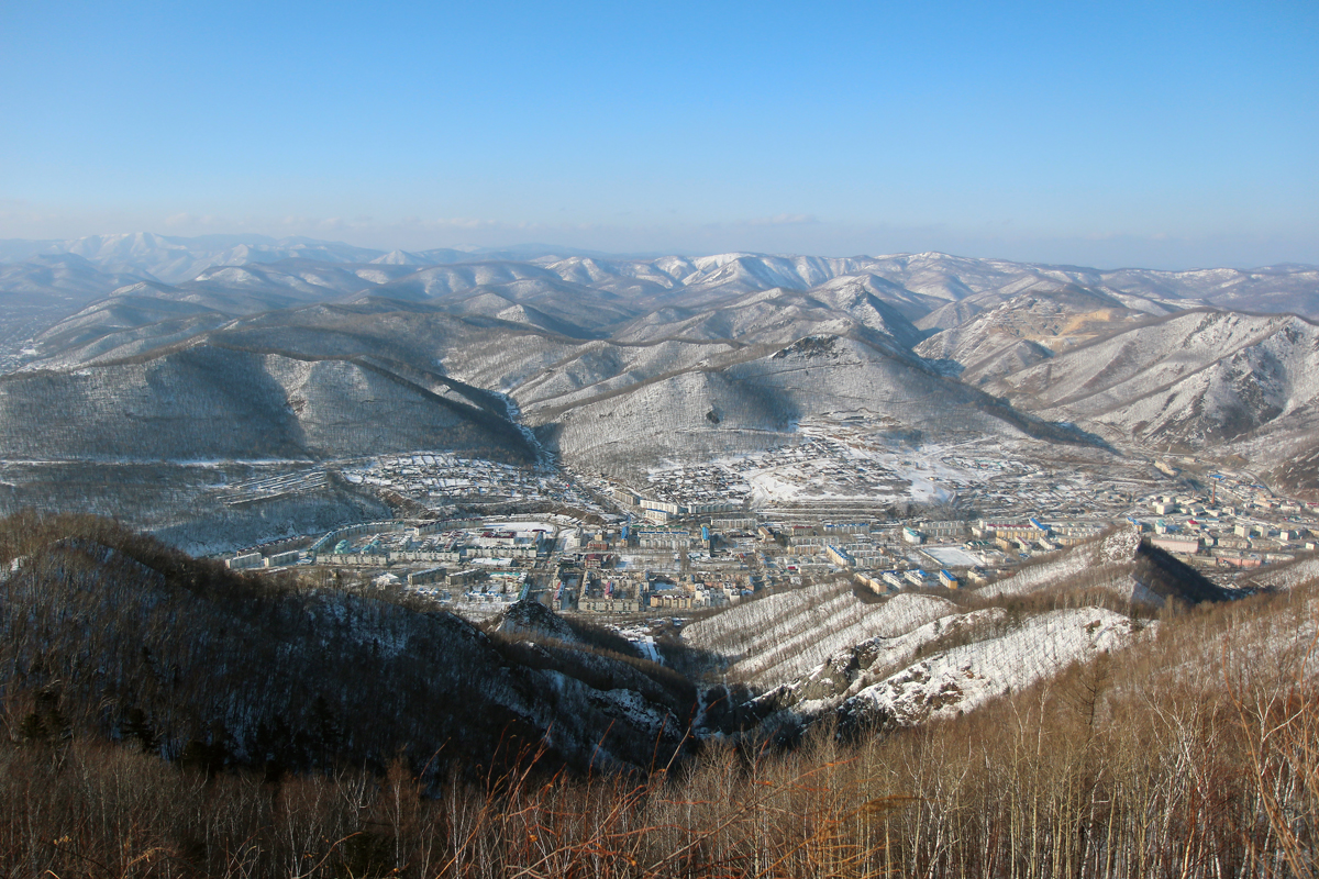 Вид на Дальнегорск с горы Телевизионная